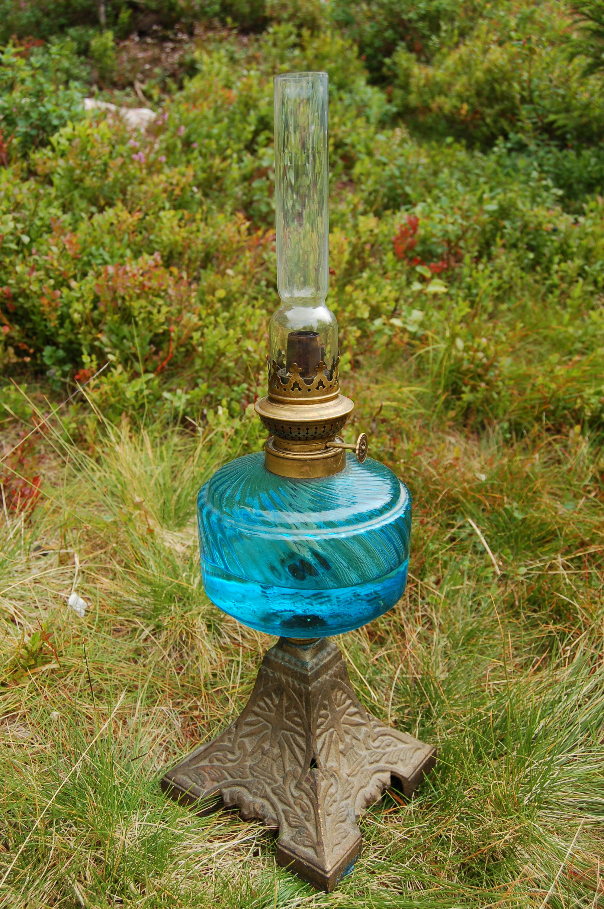 Parafinlampe med fot i støpejern - kjøpt på auksjon i Larvik